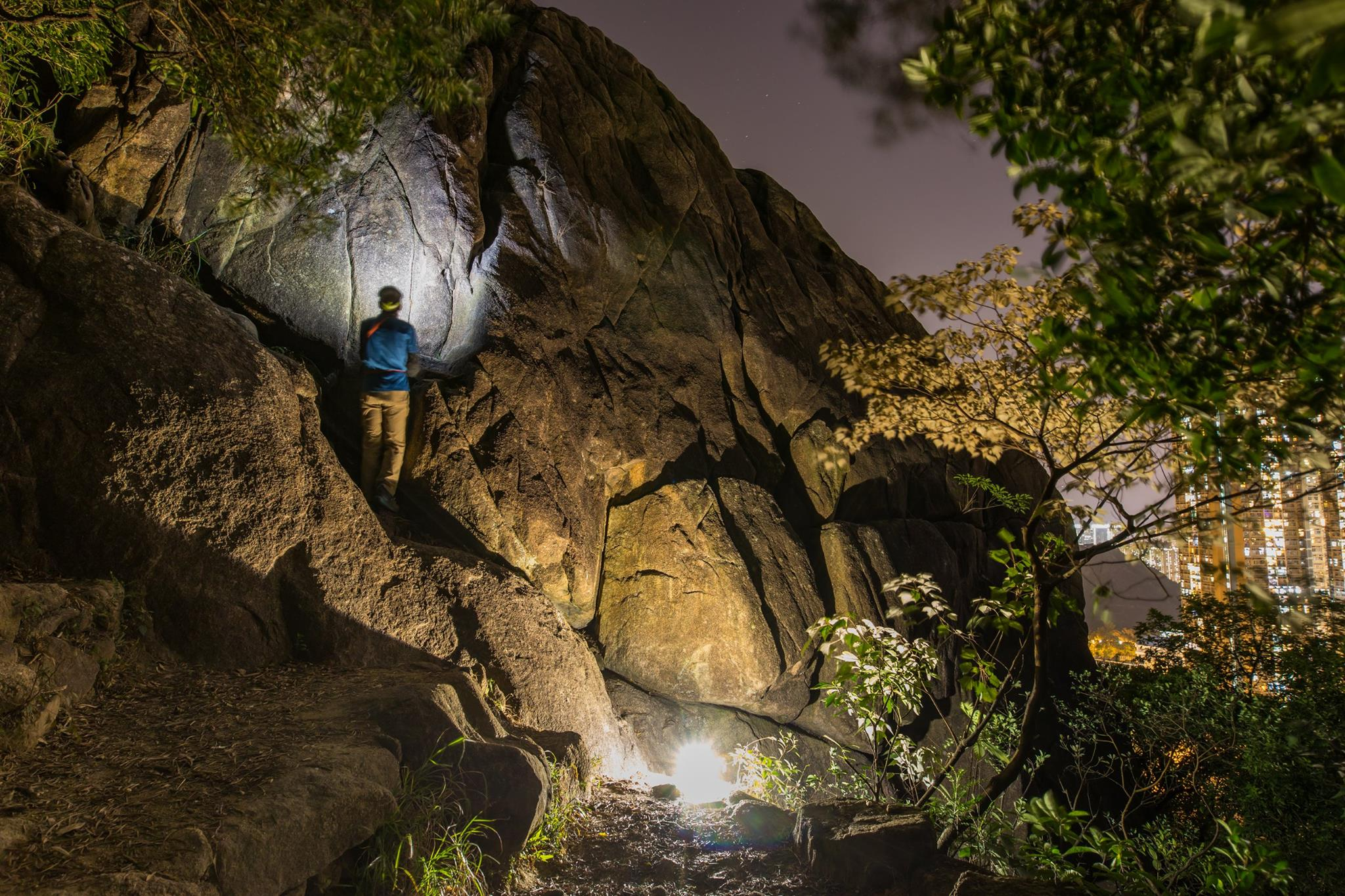 中文（香港）: 晚上觀看天鷹石